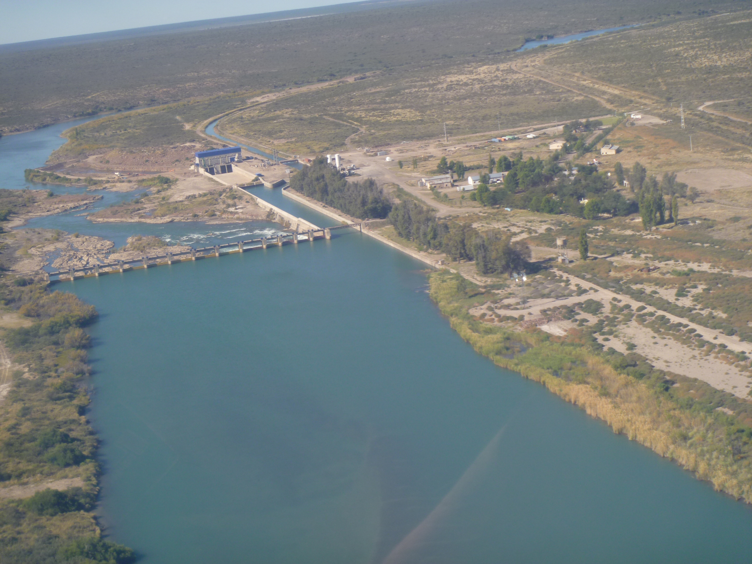 Central Hidroeléctrica Salto Andersen, sobre el río Colorado, provincia de Río negro, Argentina. Está ubicada a 66 km río arriba de la ciudad de Río Colorado.